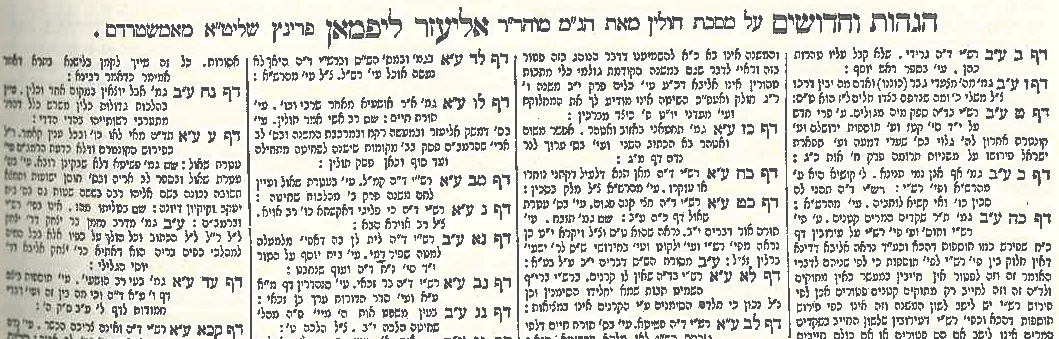 הגהות וחידושים אליעזר פרינץ צילום מדפוס וילנא